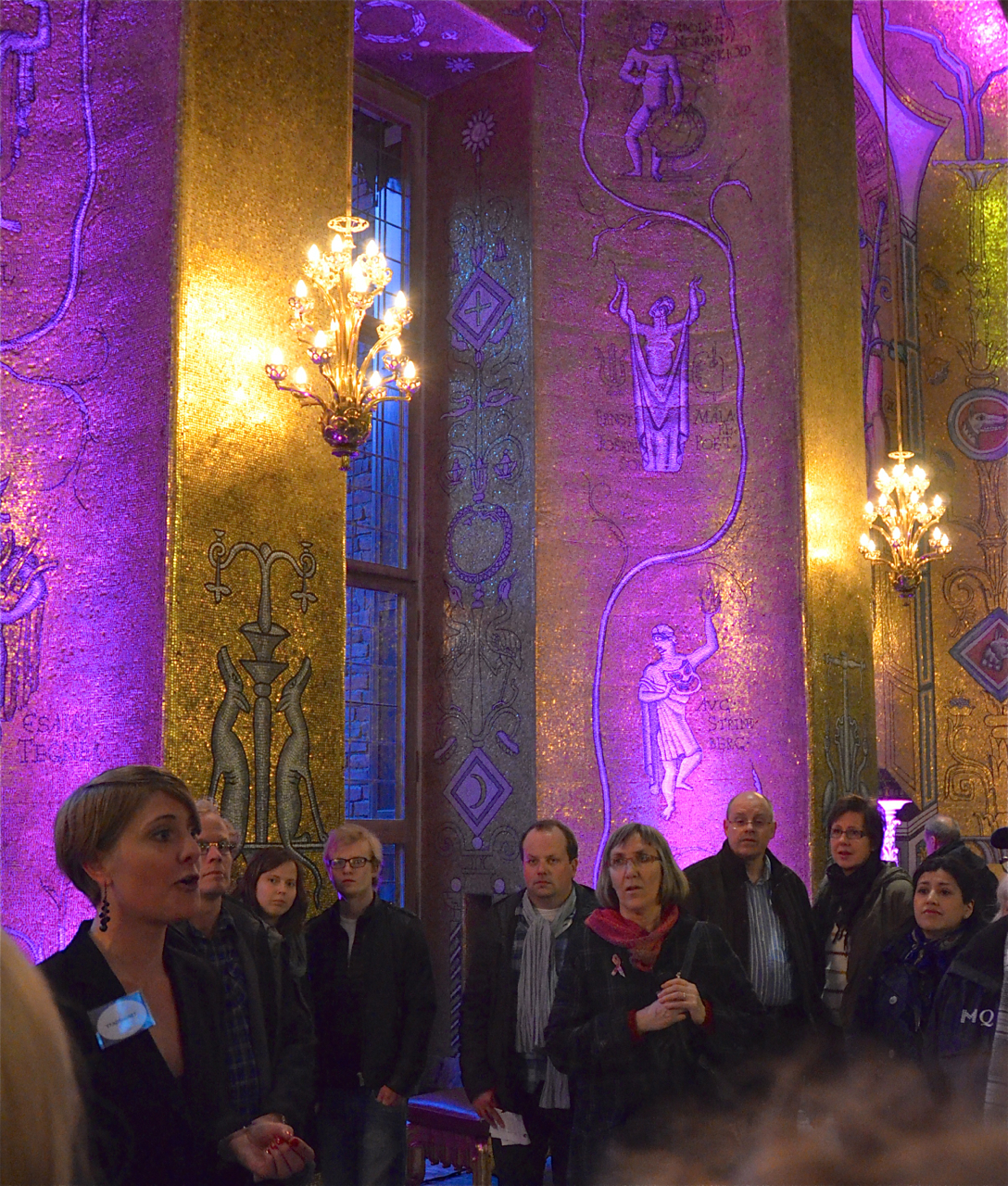 Kulturnatten i Stockholm 2012: Öppet hus i Stadshuset